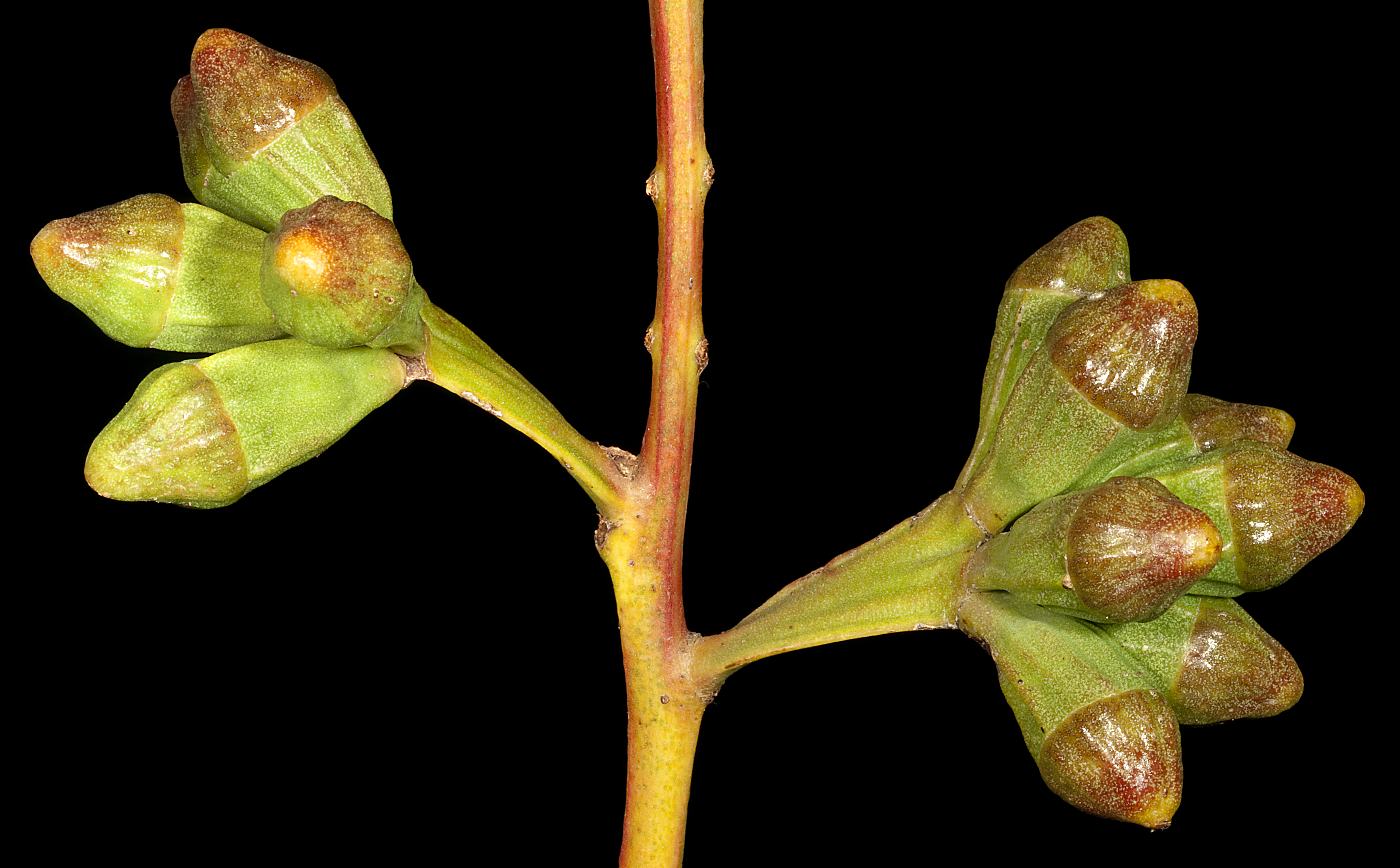 KRT4048